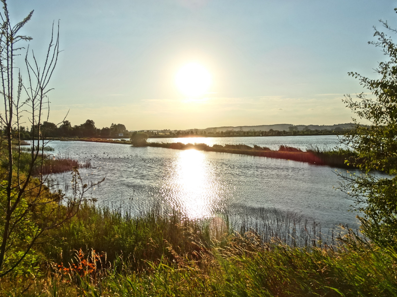 Stawy rybne w miejscowości Lisi ogon, gmina Białe Błota, powiat bydgoski. Stawy położone są w Dolinie Kanału Bydgoskiego